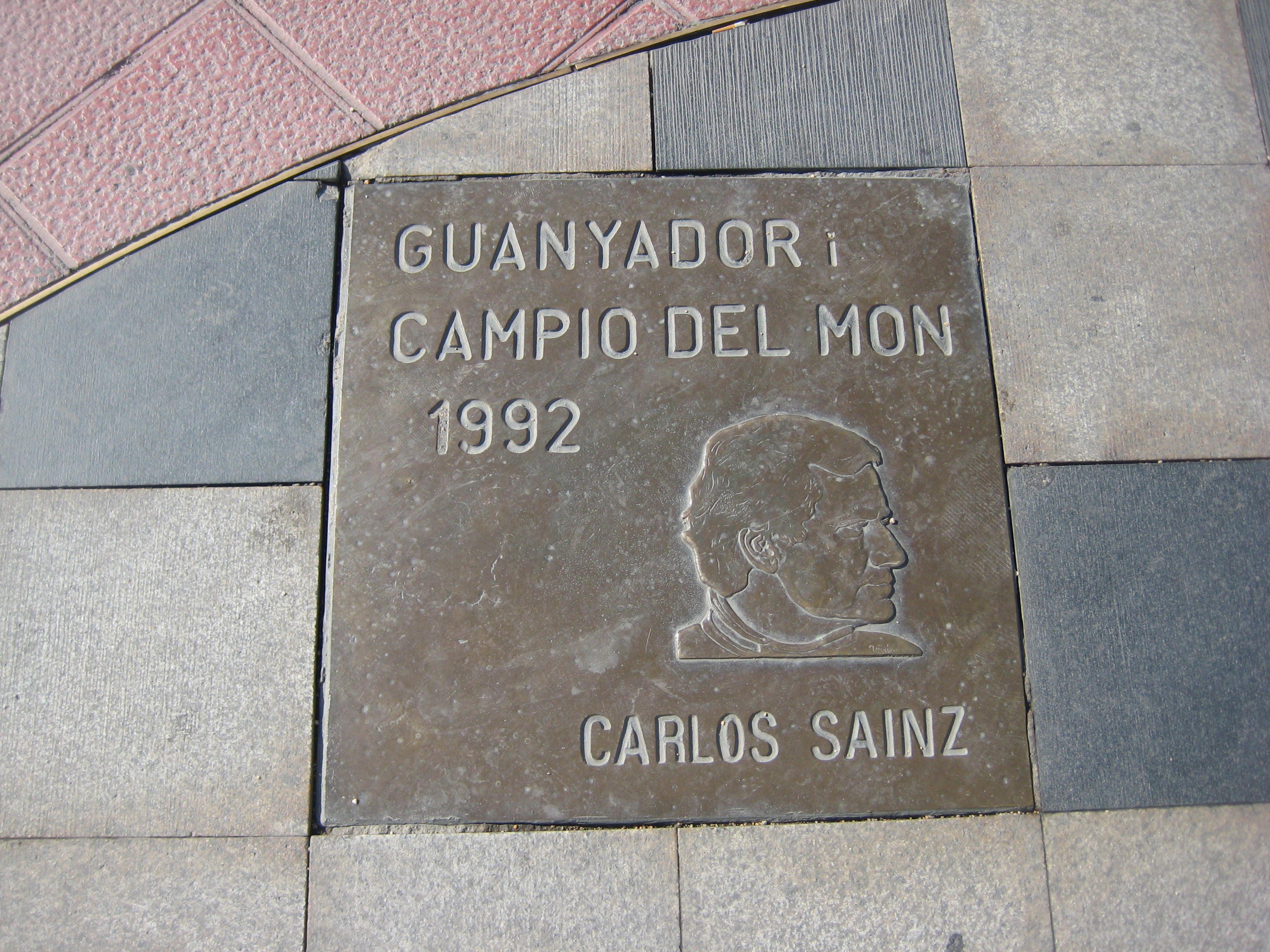 Карлос Сайнс плита на Аллее Славы в Льорет-де-Мар, Испания